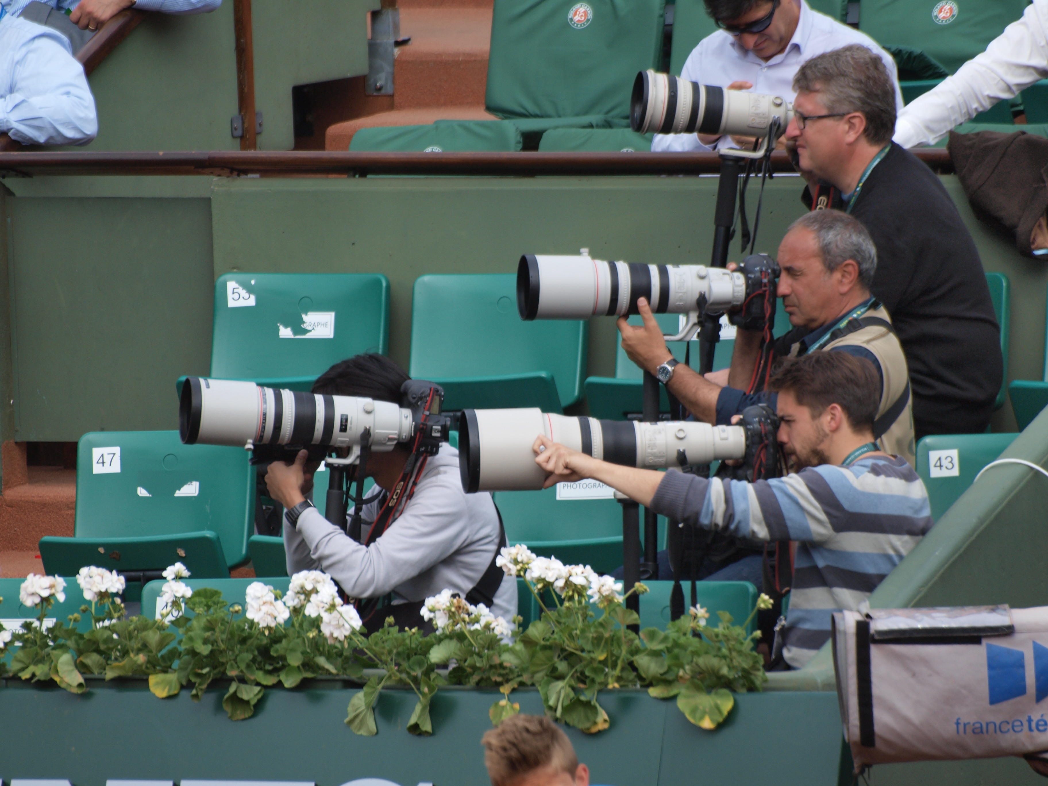 Internationaux de France de tennis, le 2 juin 2014, sur le court Philippe Chatrier